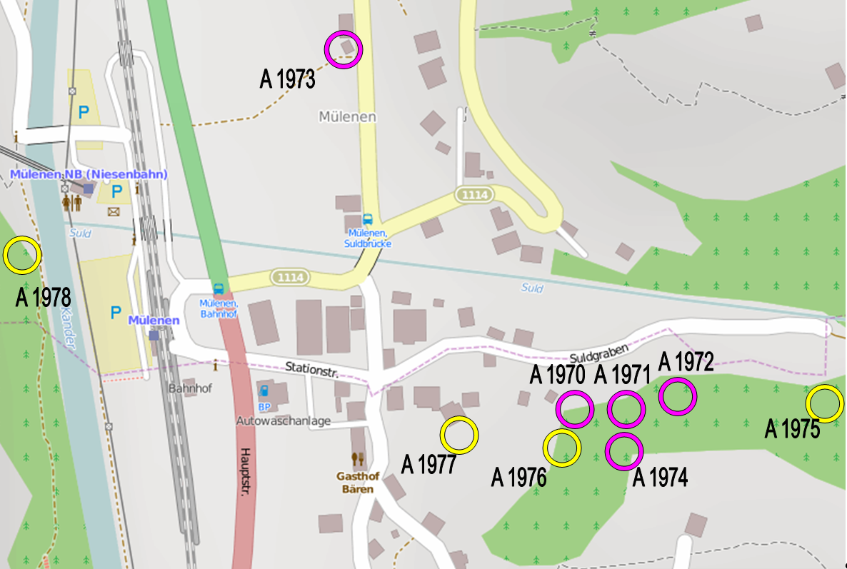 Sperrstelle Mülenen BE, Schweiz